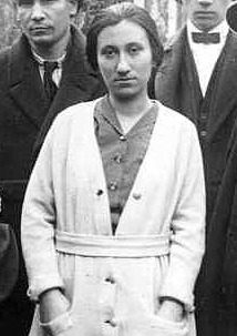 A bécsi Ma munkatársai 1922-ben: Bortnyik Sándor, Uitz Béla, Újvári Erzsi, Simon Andor, Kassák Lajos, Simon Jolán, Barta Sándor.